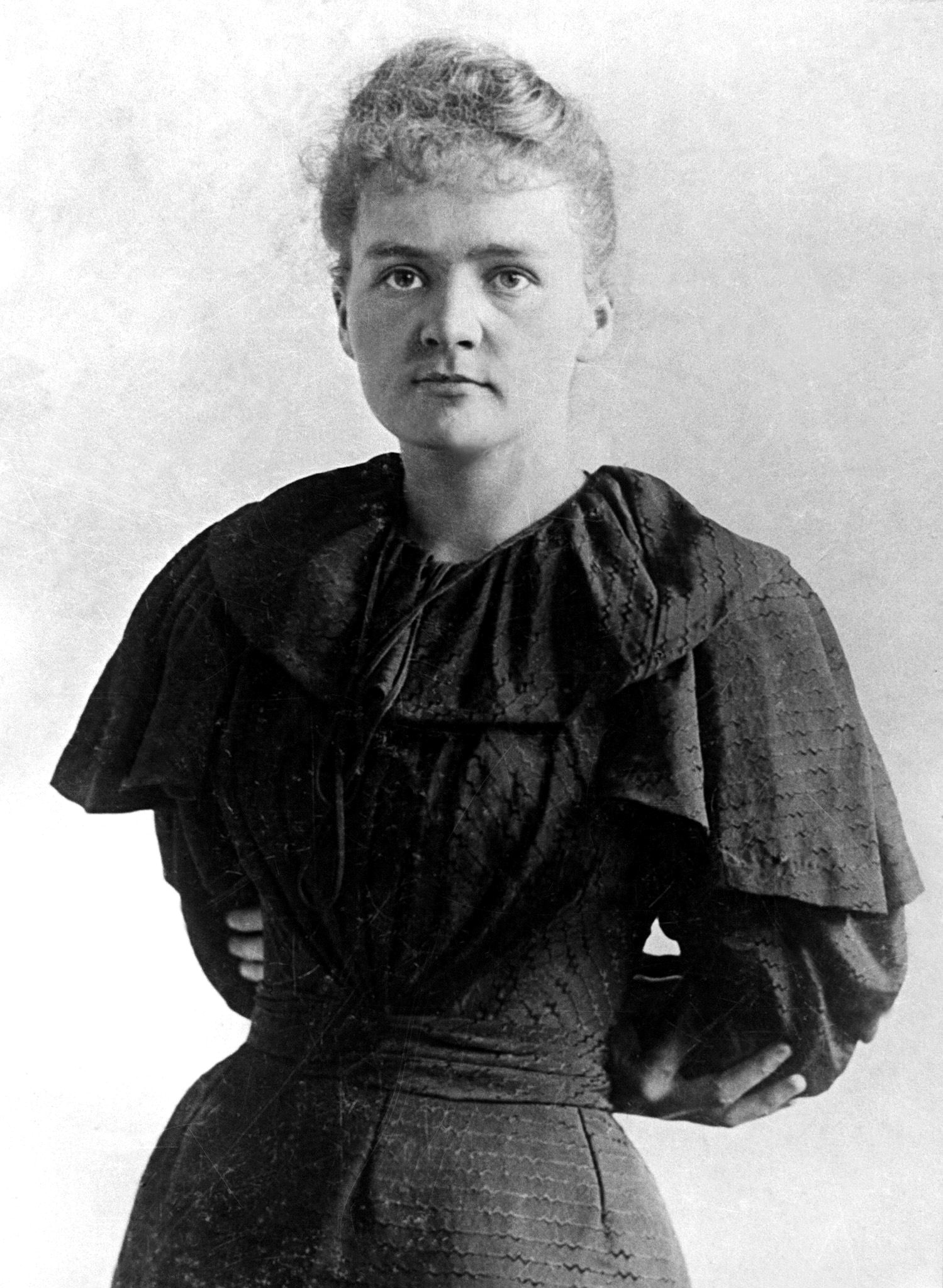 Cela lui permet d’être reçue première à la licence de Physique en juillet 1893. L’année suivante, elle passe la licence de Mathématiques et est reçue troisième.